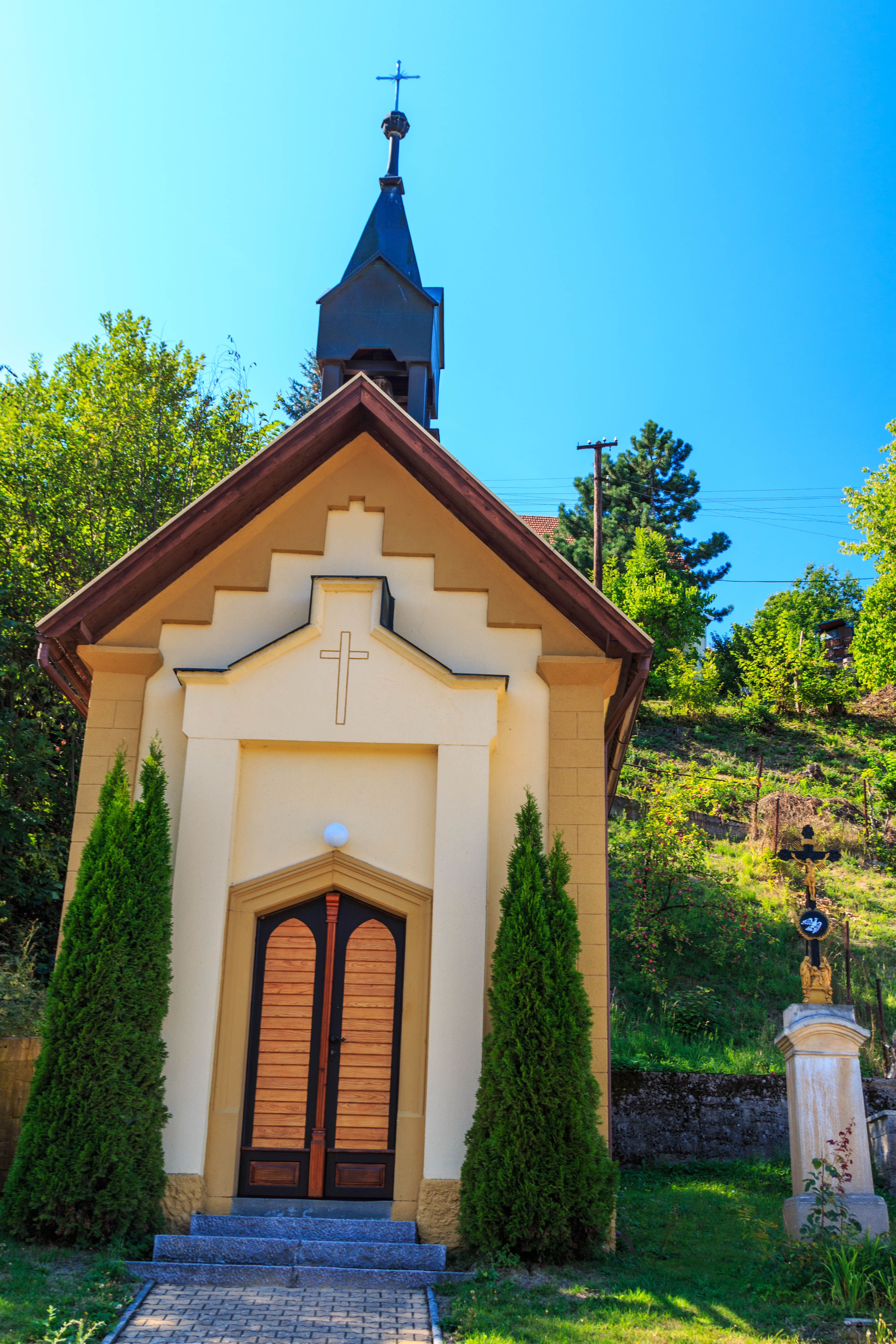 Hluboká kaple